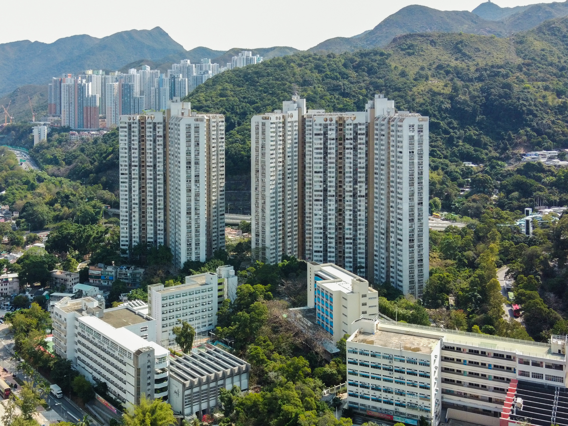 Fung Shing Court